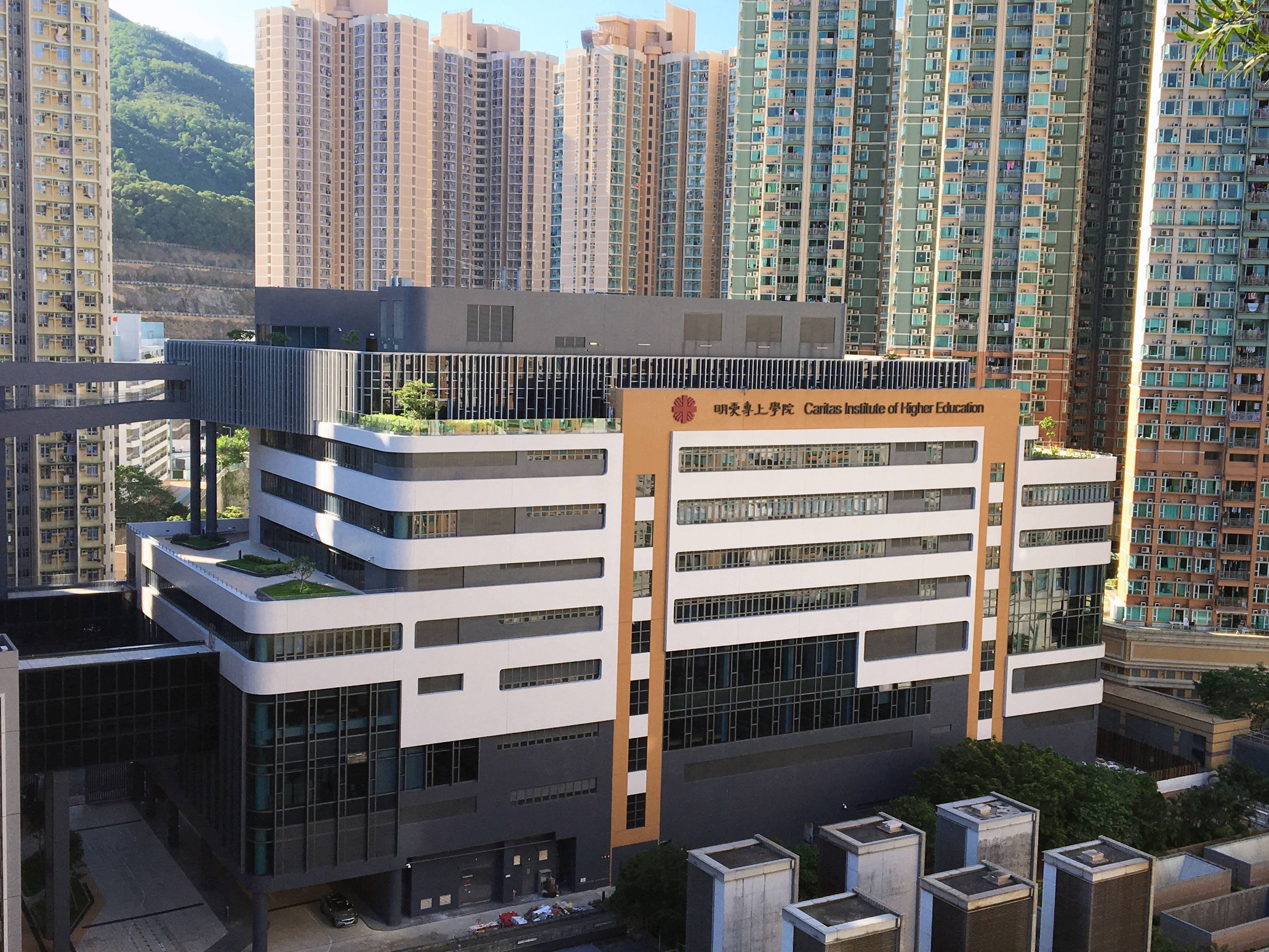 明愛專上學院調景嶺校舍